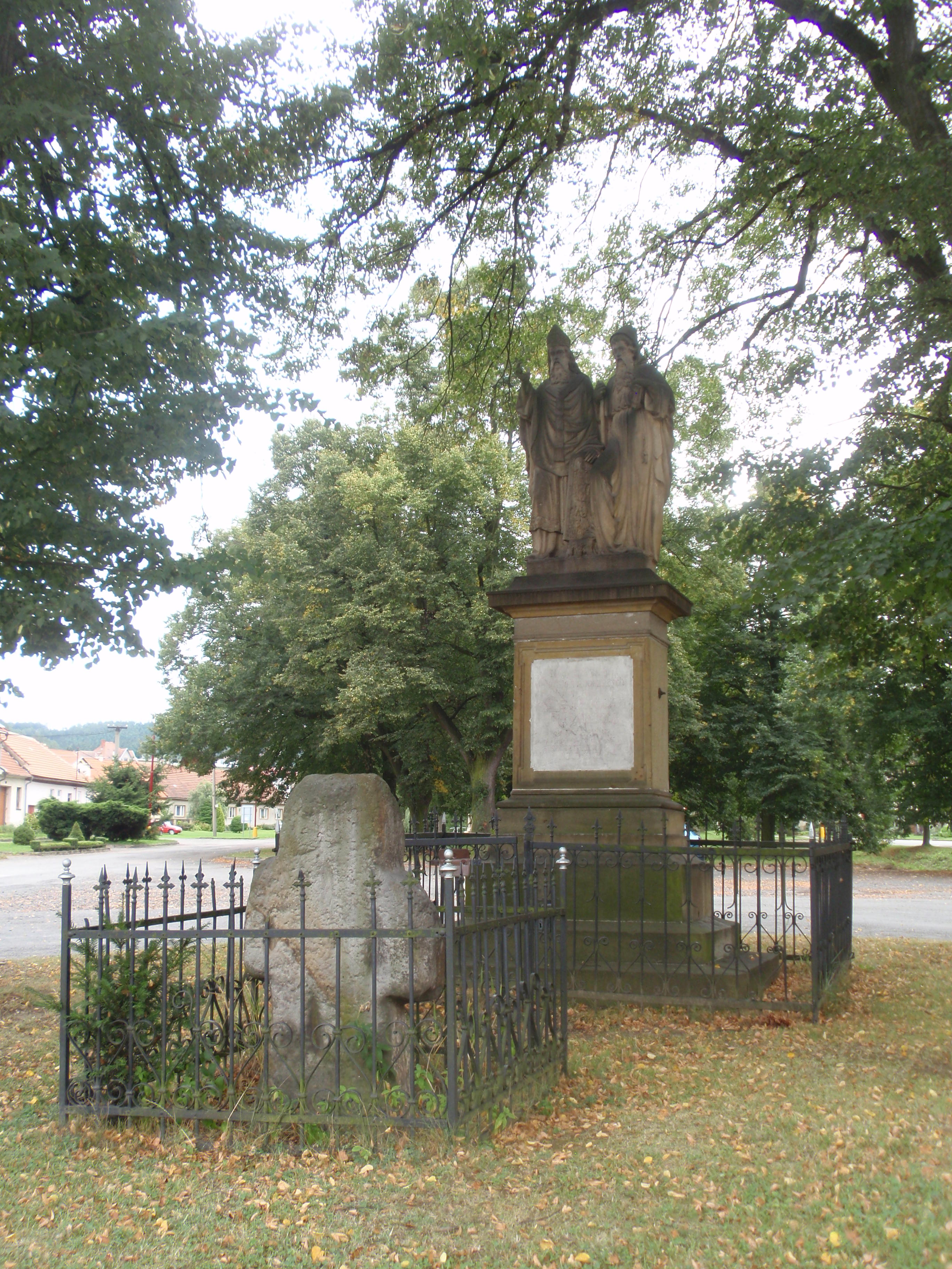 Sousoší sv. Cyrila a Metoděje (Jaroměřice), Jaroměřice